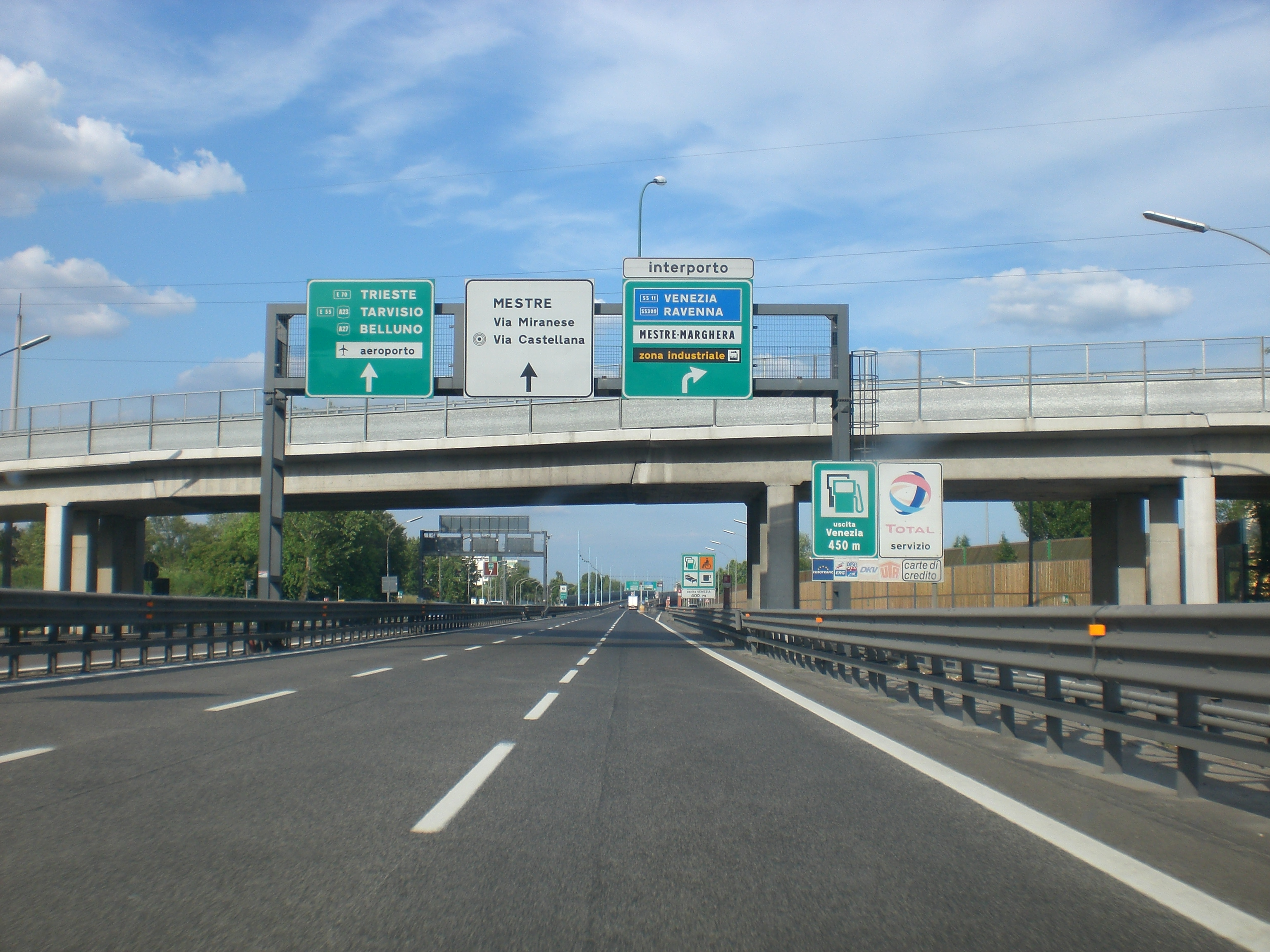 Tangenziale di Mestre in direzione est dopo la barriera Venezia Mestre